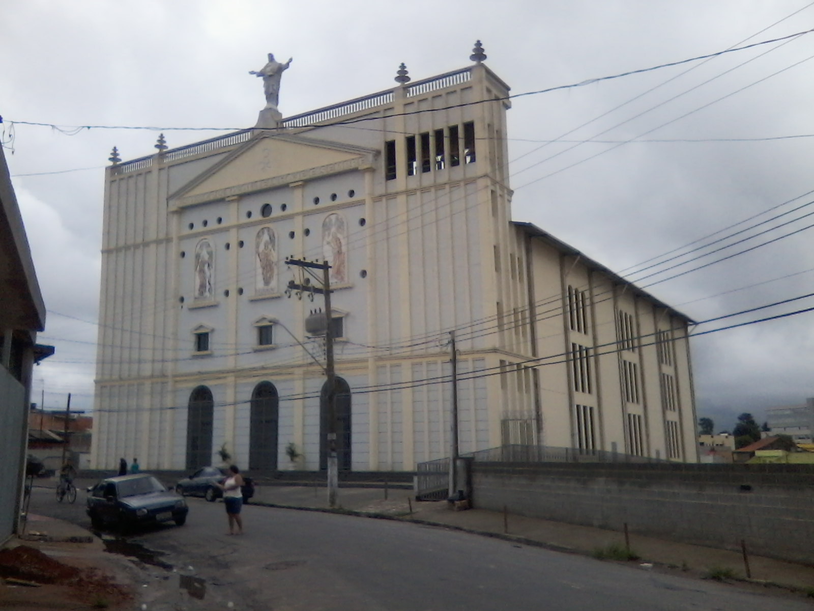 Imagem parcial da Paróquia dos Santos Apóstolos, em Itaquaquecetuba, em 2012.